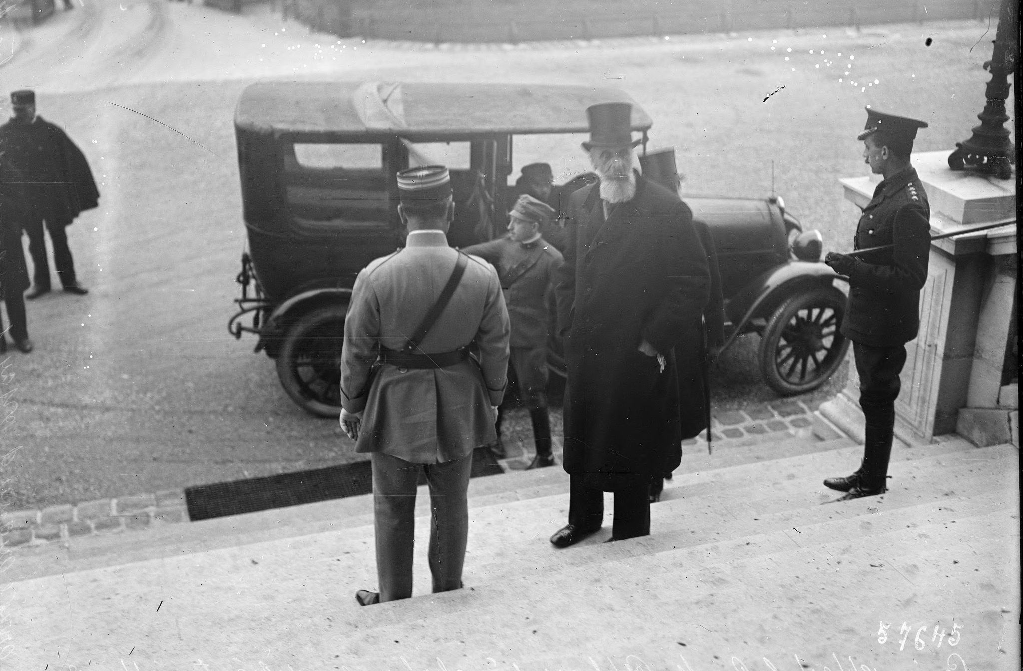 Le comte Apponyi, chef de la délégation hongroise, arrive au quai d'Orsay pour la remise du traité de paix